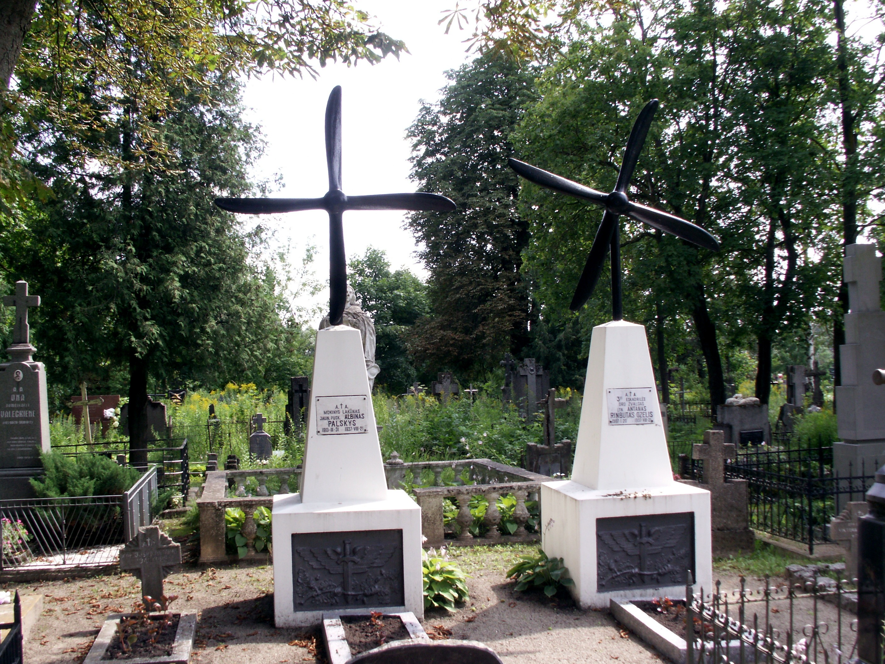 Šiaulių senosios kapinės. Lakūnų Palskio ir Oželio kapas.